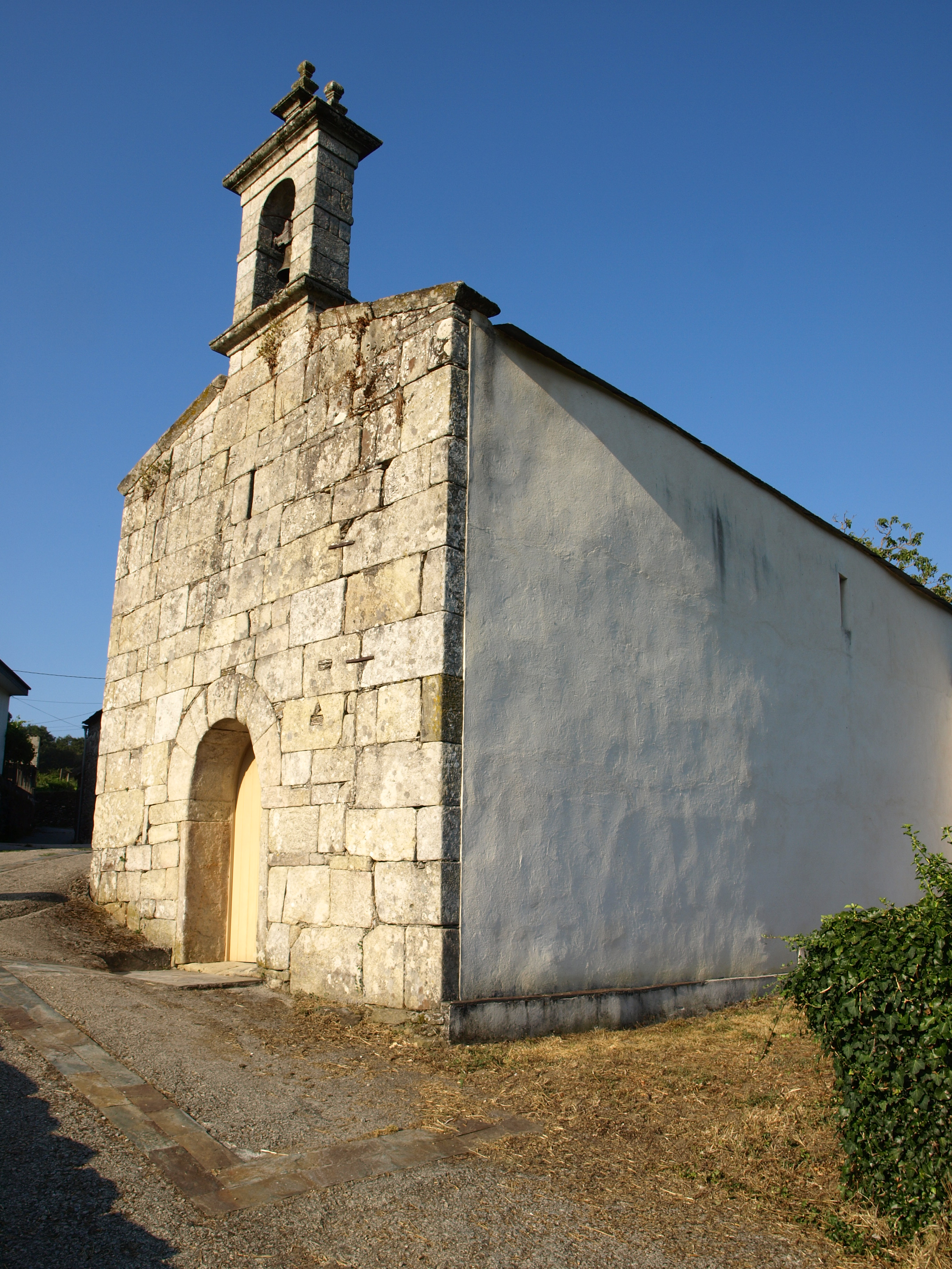 Capela de Loio de As Cortes (Paradela)